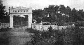 1933年7月之前的广东省立工科专业学校